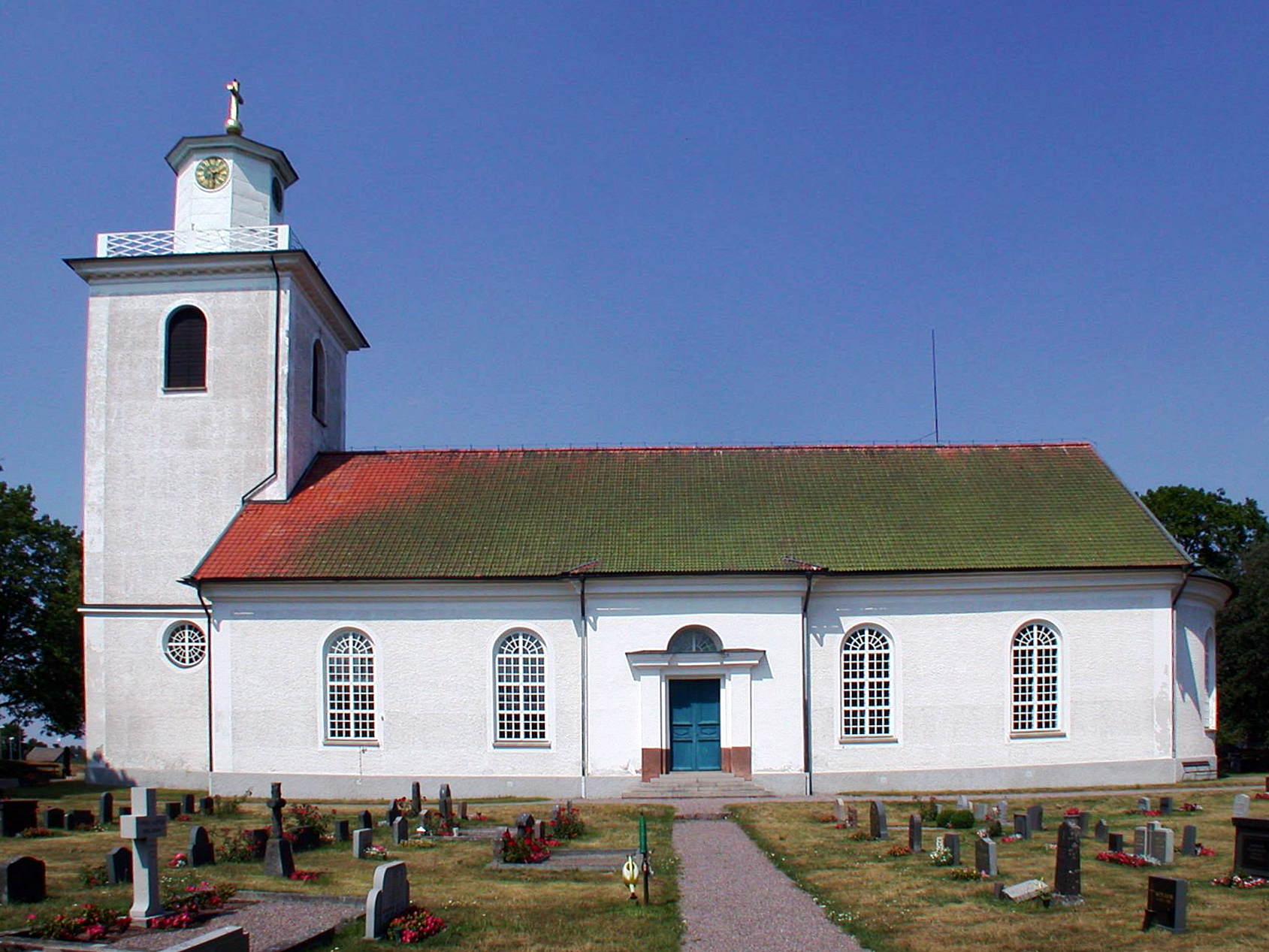 Bäckebo church, Nybro, Sweden